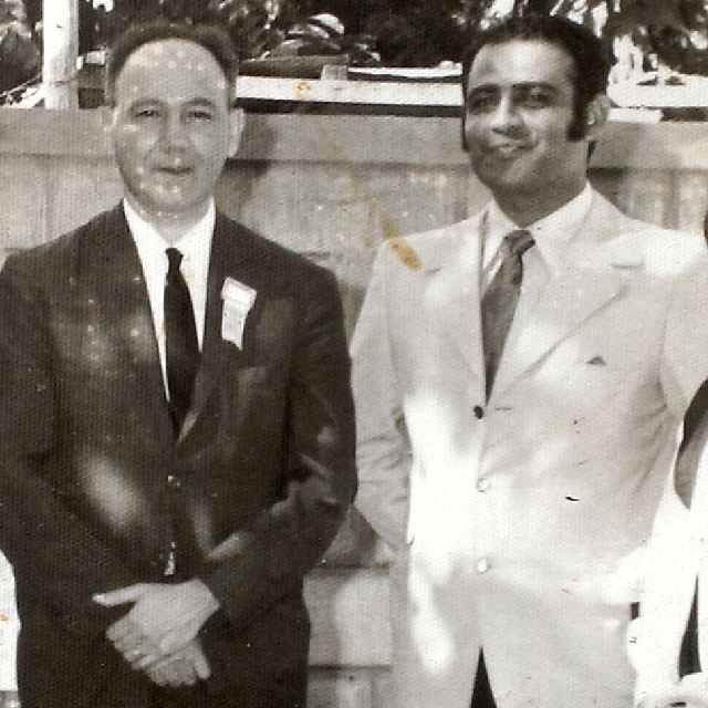 El Profesor Eduardo González junto al Doctor Humberto Fernández Morán.